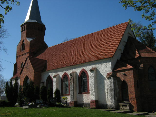 Mierzęcin - rzymskokatolicki kościół filialny p.w. Niepokalanego Poczęcia NMP